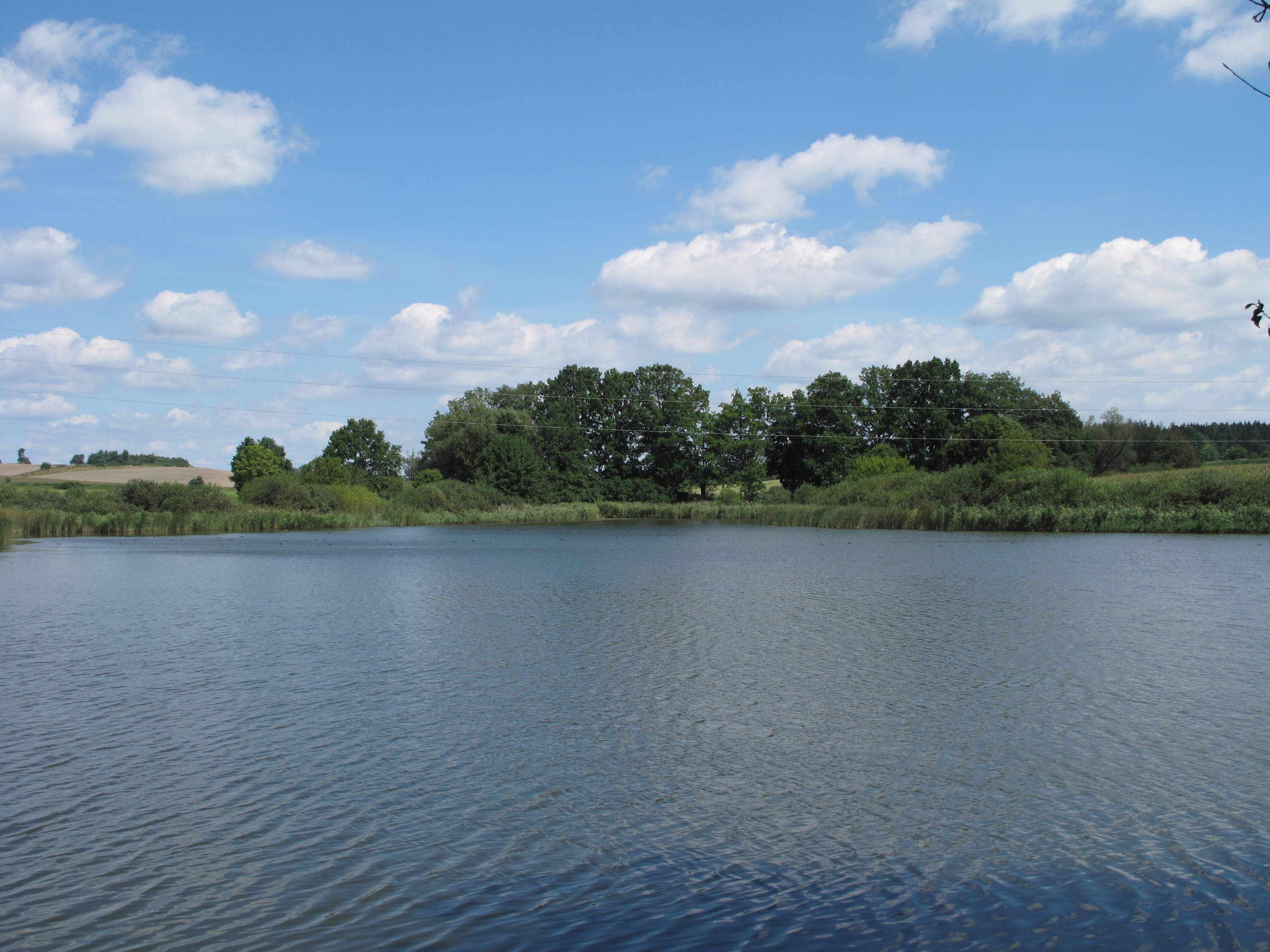 Nádvorný rybník. Okres Písek, Česká republika.